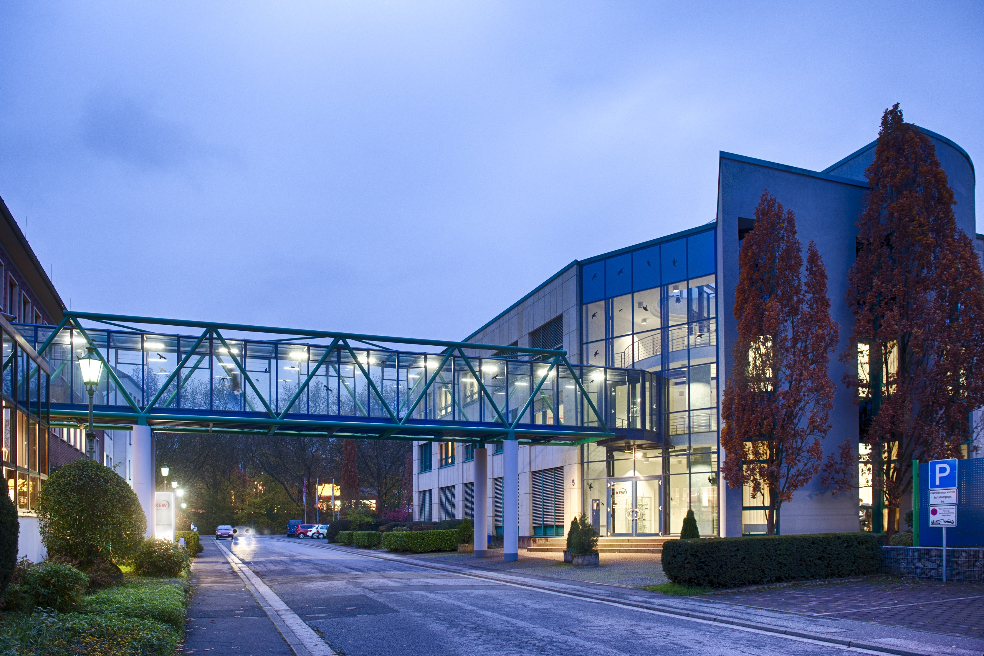 Hauptgebäude der KEW